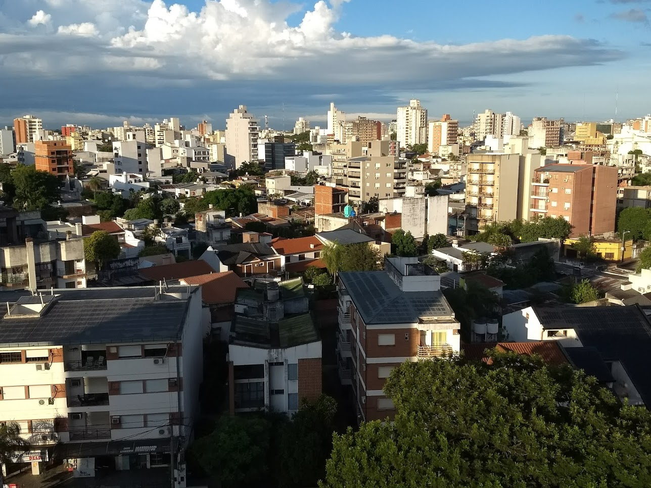 El norte de la Ciudad de Corrientes en marzo de 2018